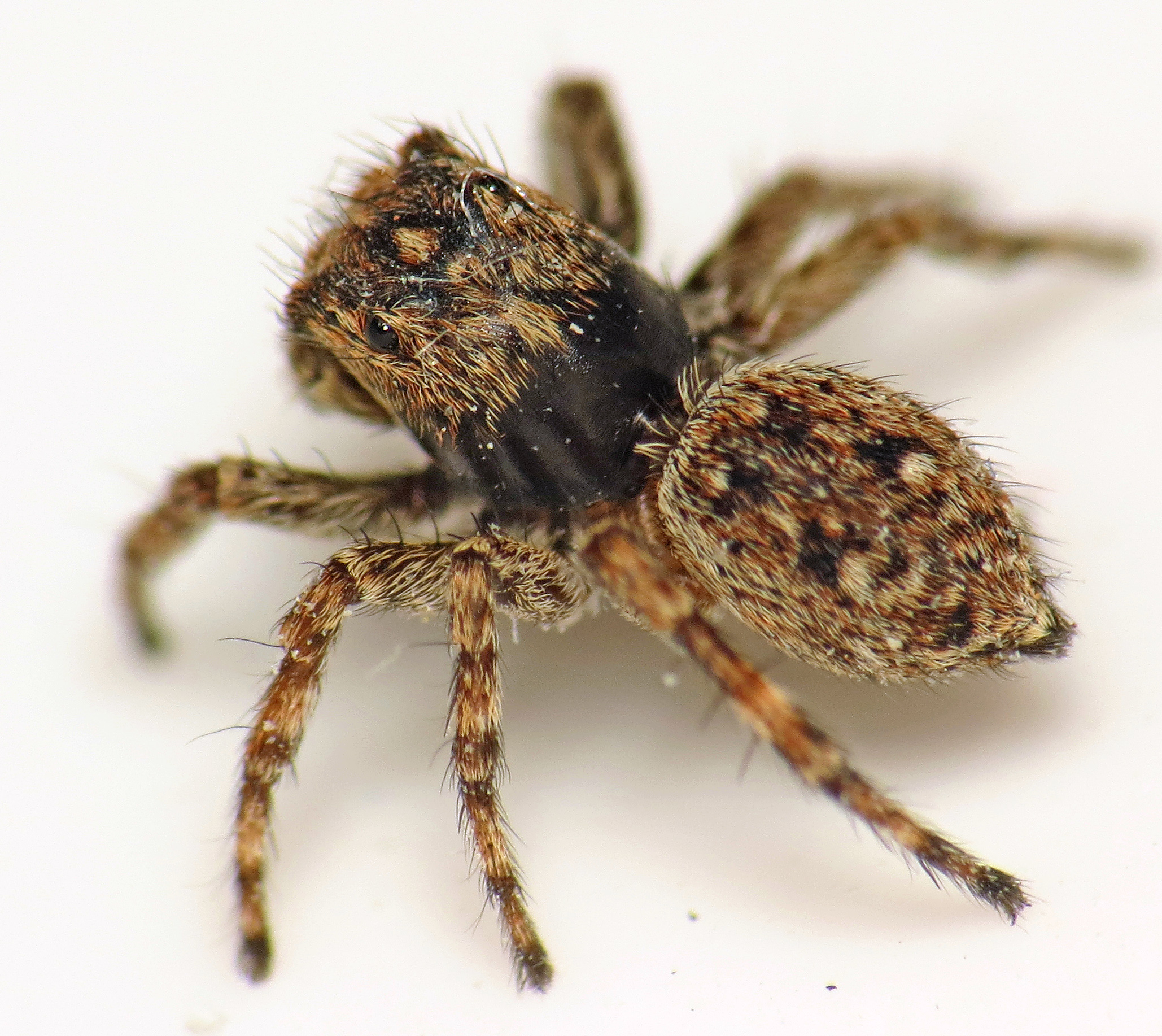 male Sitticus pubescens